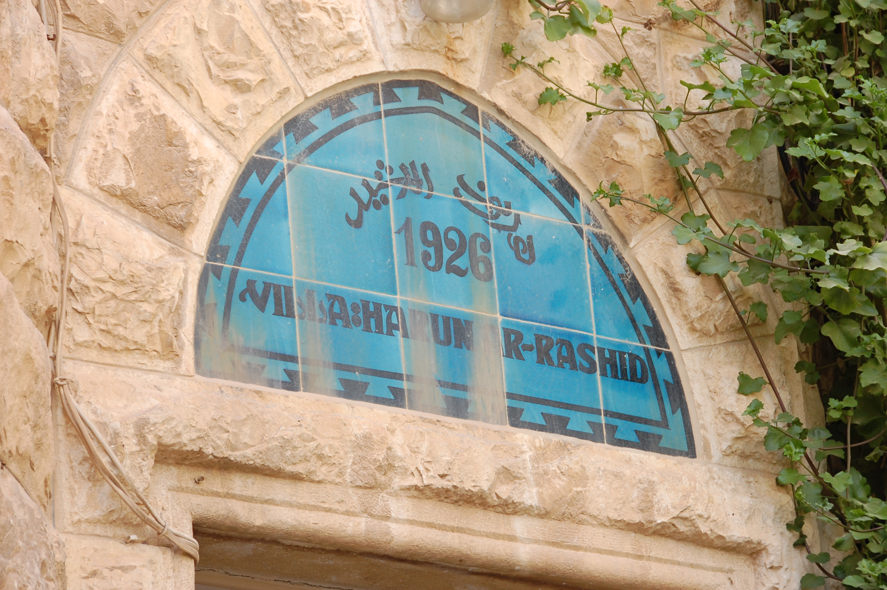 Villa Harun ar-Rashid